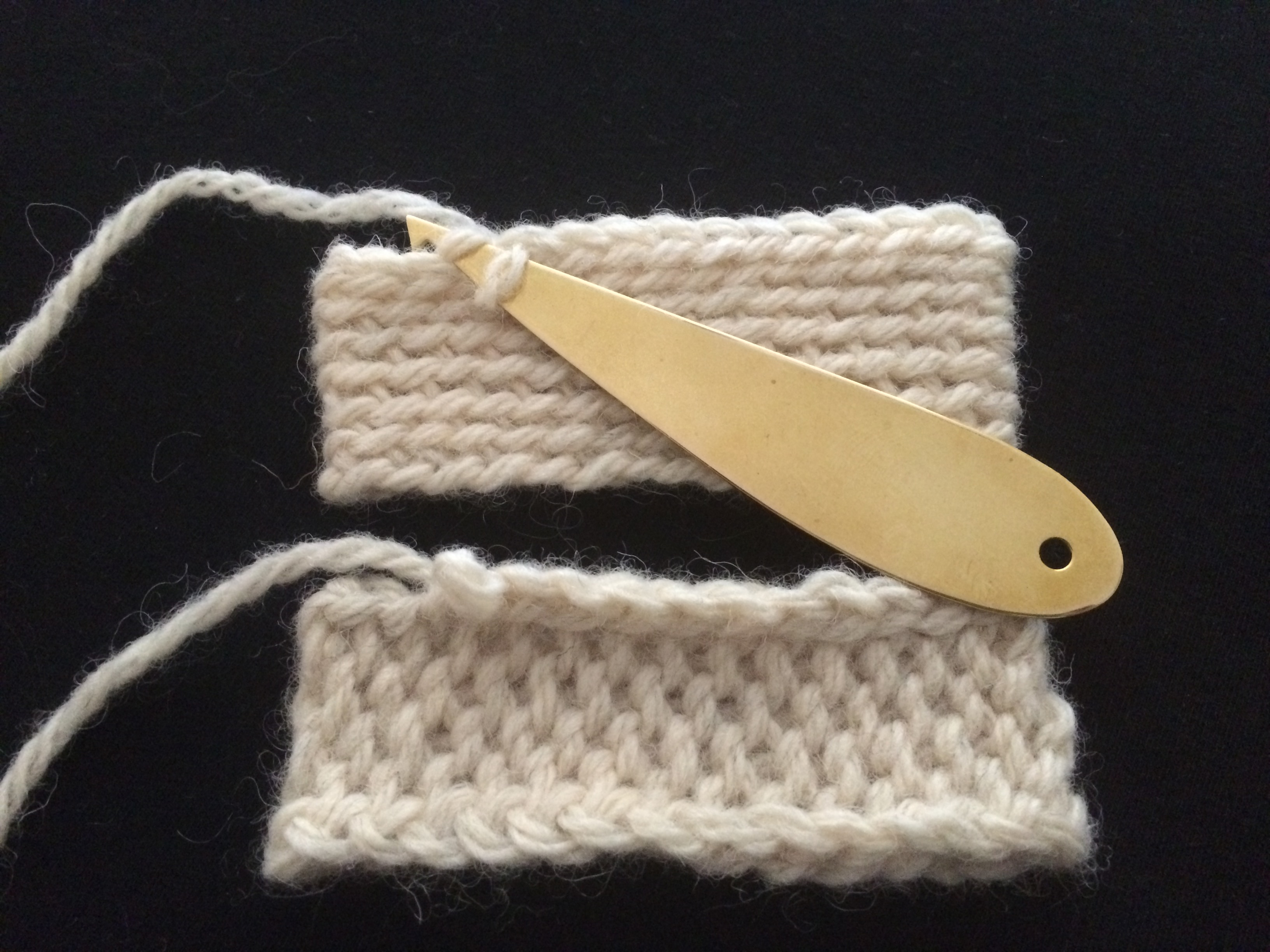 Eksempler på pjoning. Den øverste: pjoning i bakre maskeledd, den nederste: pjoning i fremre maskeledd